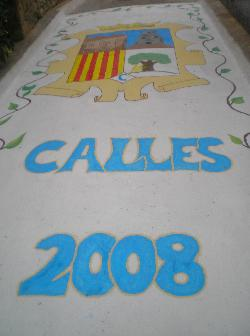 es una muestra de calles pintada